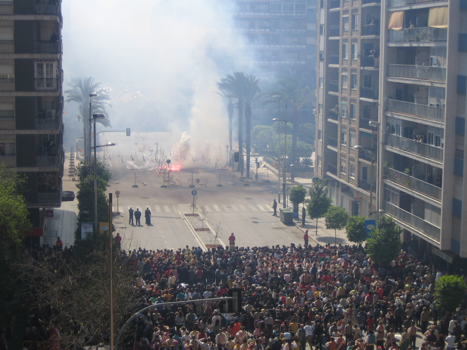 Disparo de una "mascletà" de fallas en Alzira.